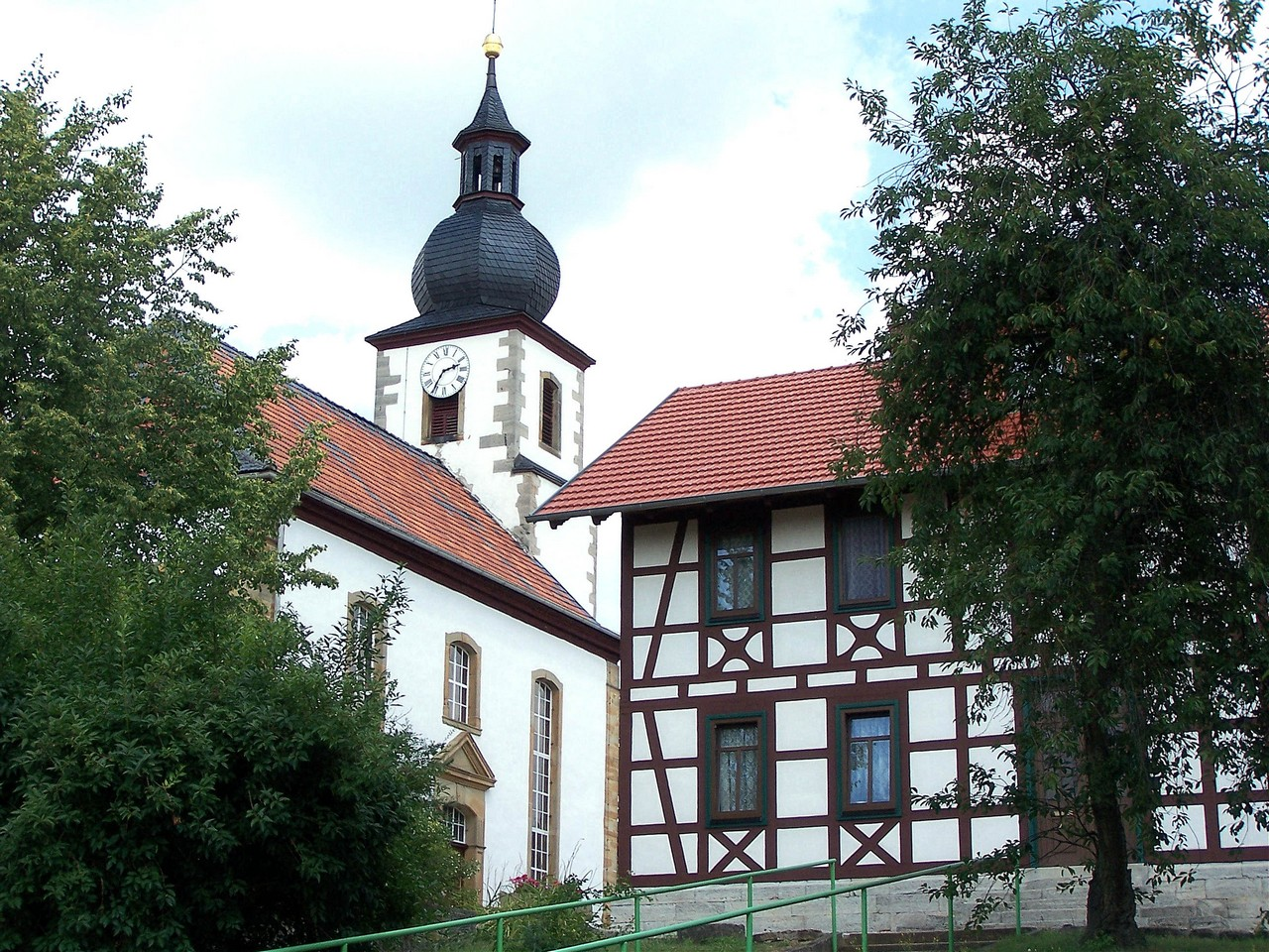 Church of Schwickershausen